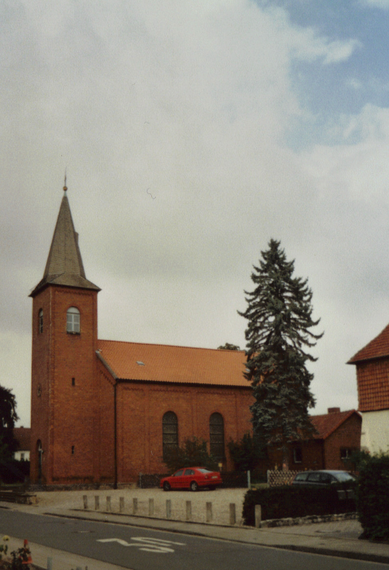 Ehemalige Pfarrkirche St. Godehard (1978 geschlossen) in Hildesheim-Ochtersum.